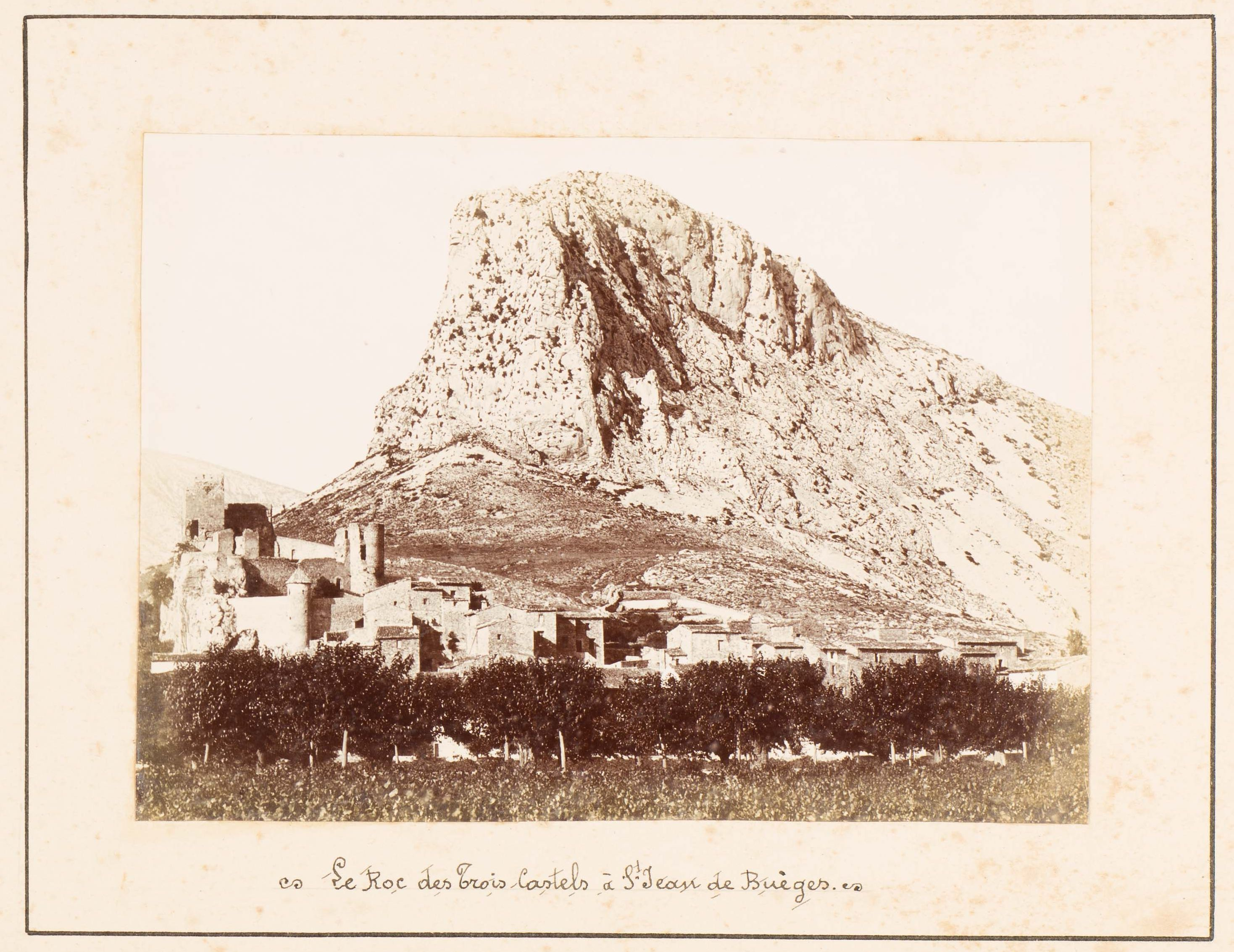 Le Roc des Trois Castels à Saint-Jean-de-Buèges : photographie.